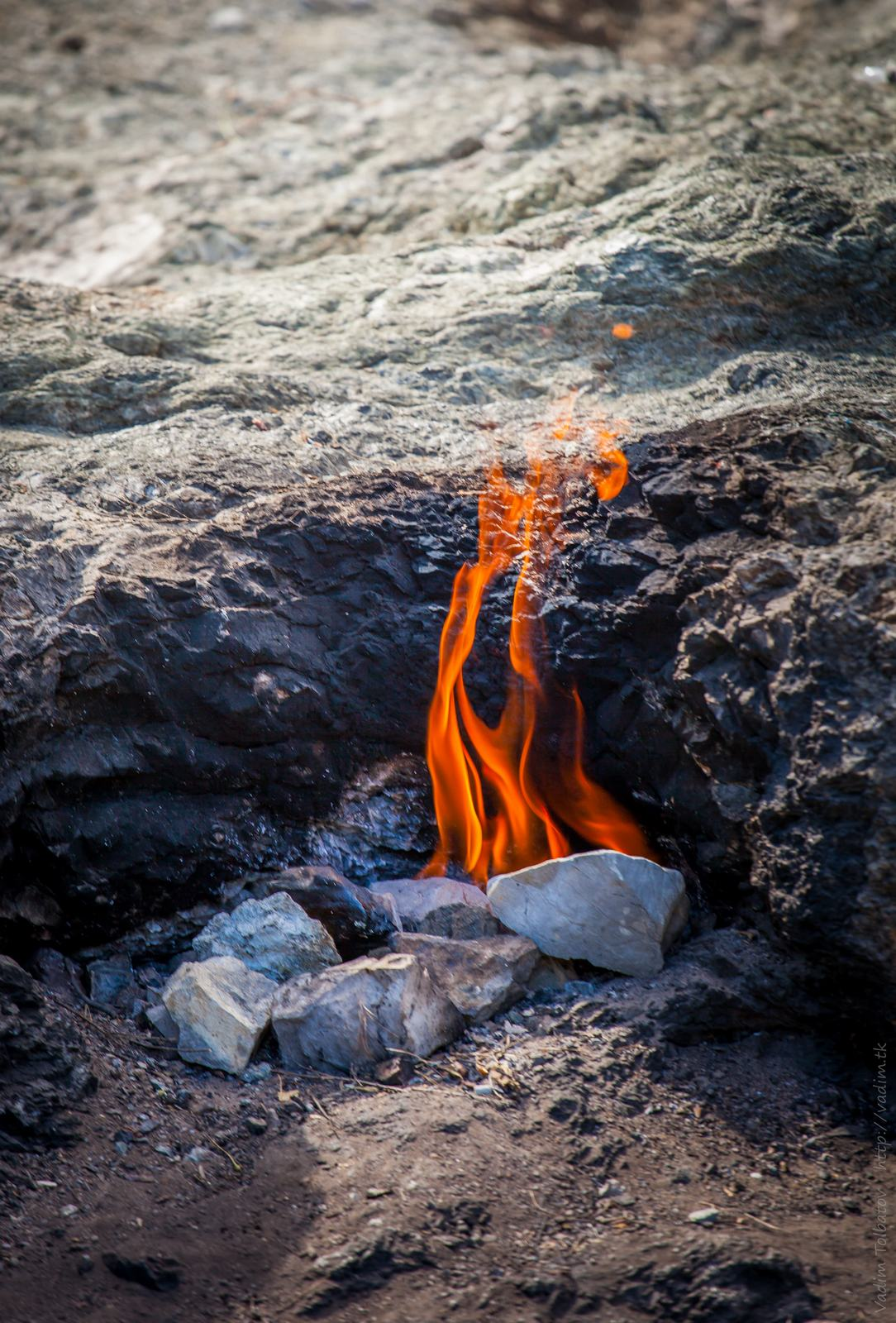 Огни Химеры, Турция